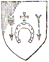 Herb wsi Boża Wola, gmina Zakrzew.